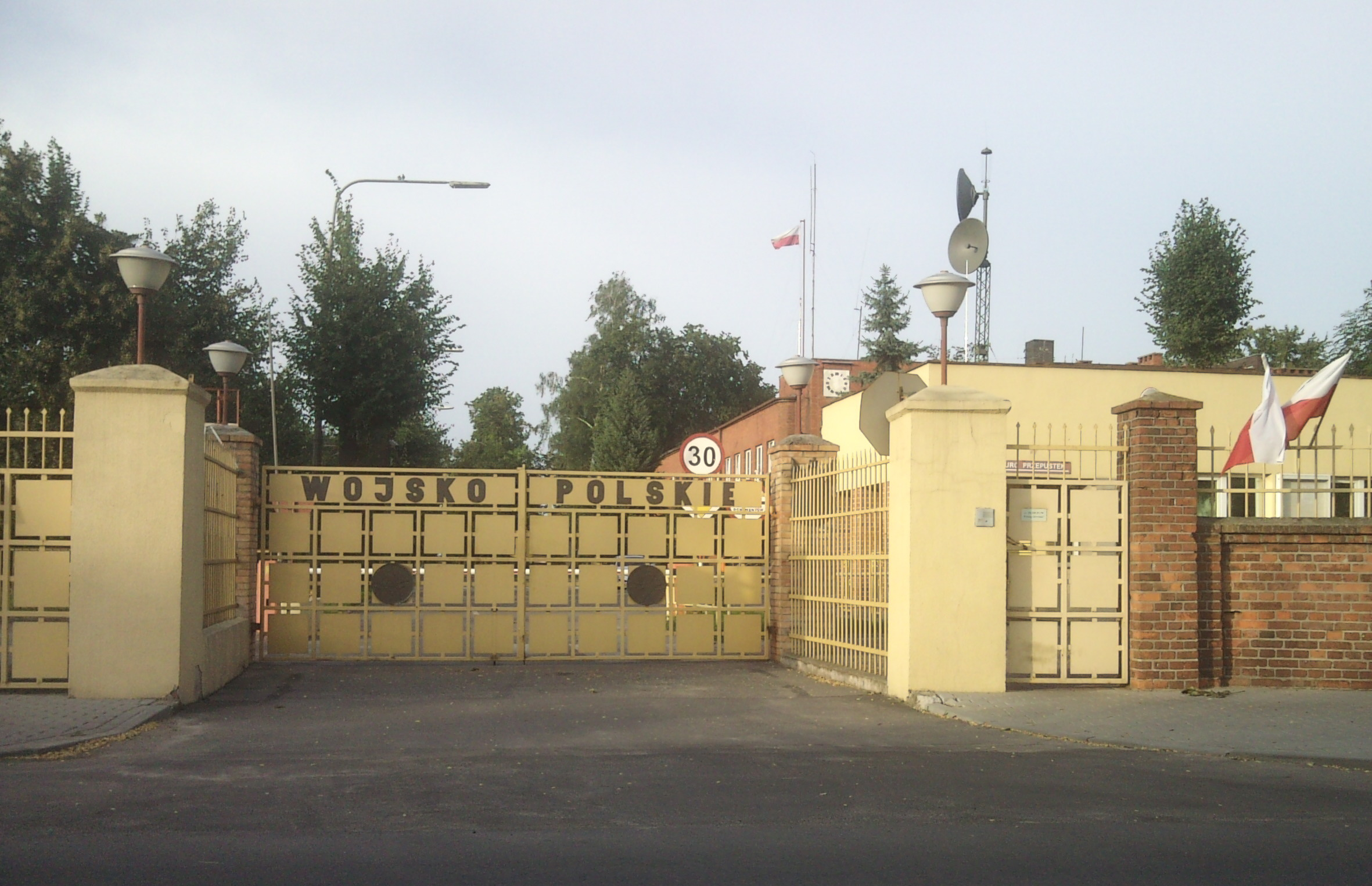 Jednostka Wojskowa w Sieradzu